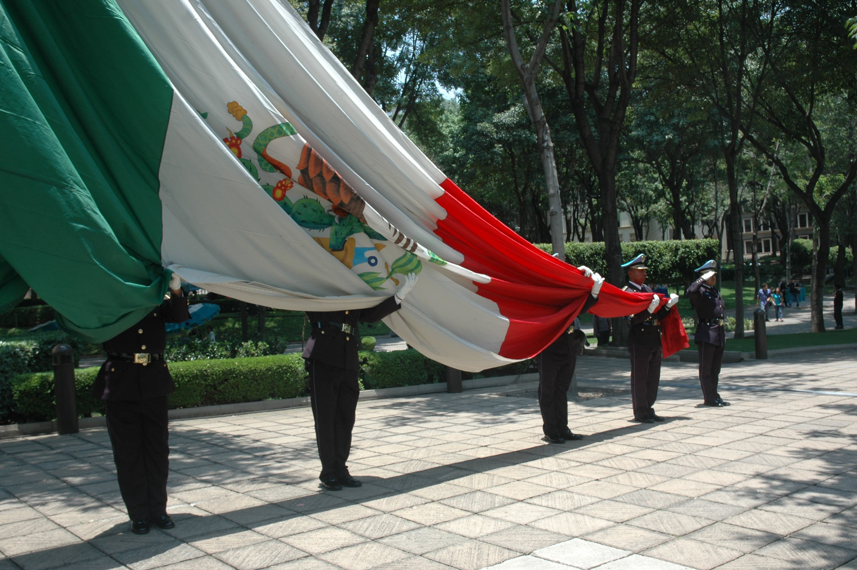 Levantar la bandera mexicana en la ceremonia de firmar el Convenio de Colaboración y Vinculación Ciudadana para la Creación de Corredores Seguros Universitarios en ITESM Campus Ciudad de México